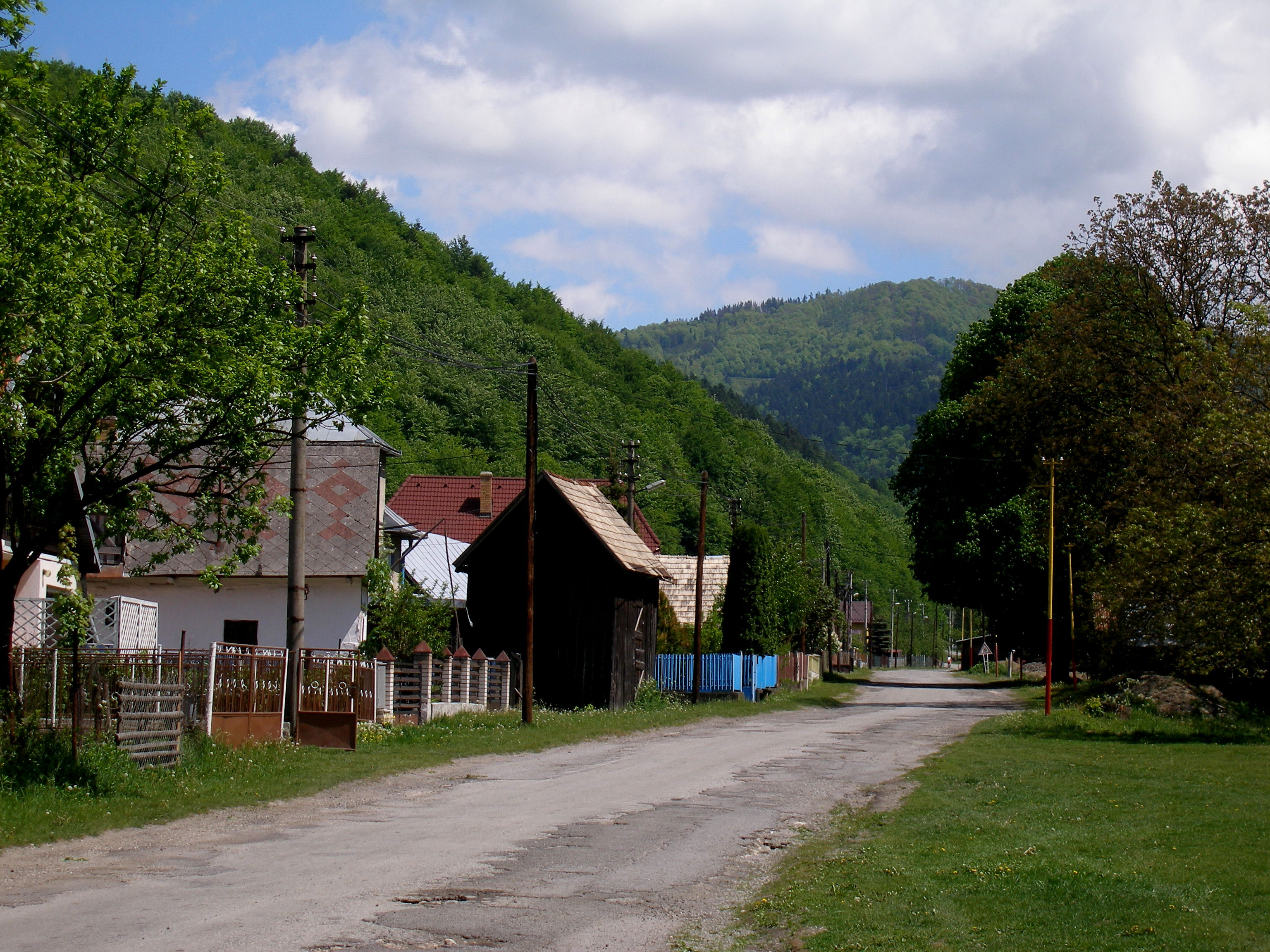 Obec Olejníkov okres Sabinov.